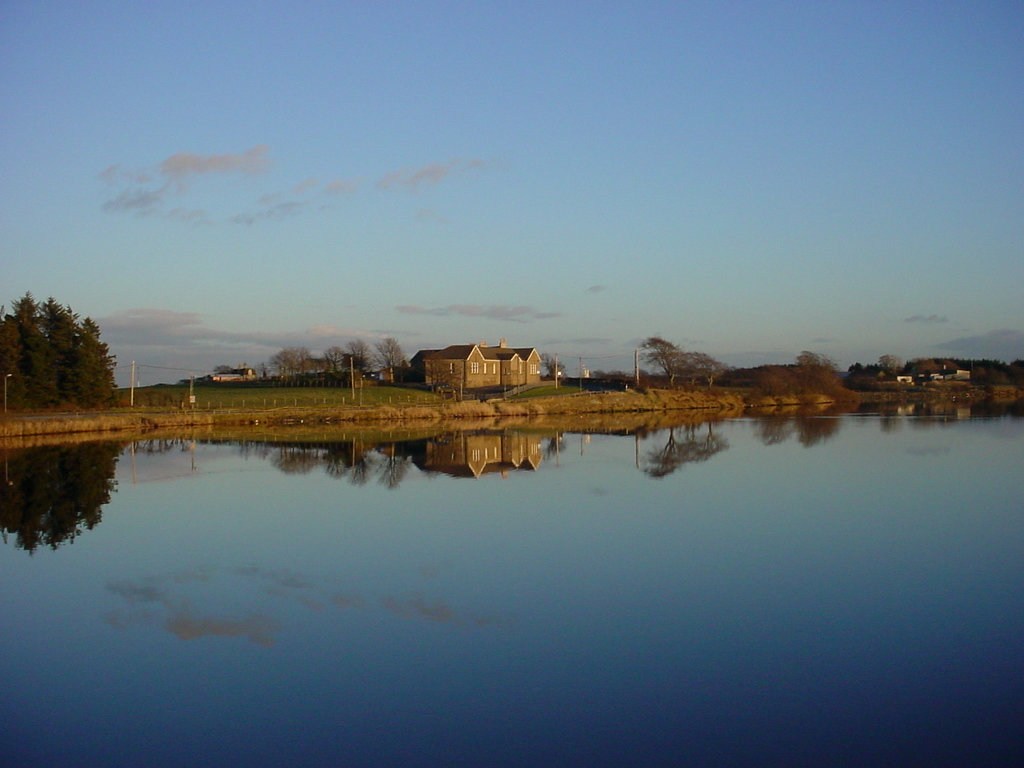 Black Loch, Falkirk, Scotland